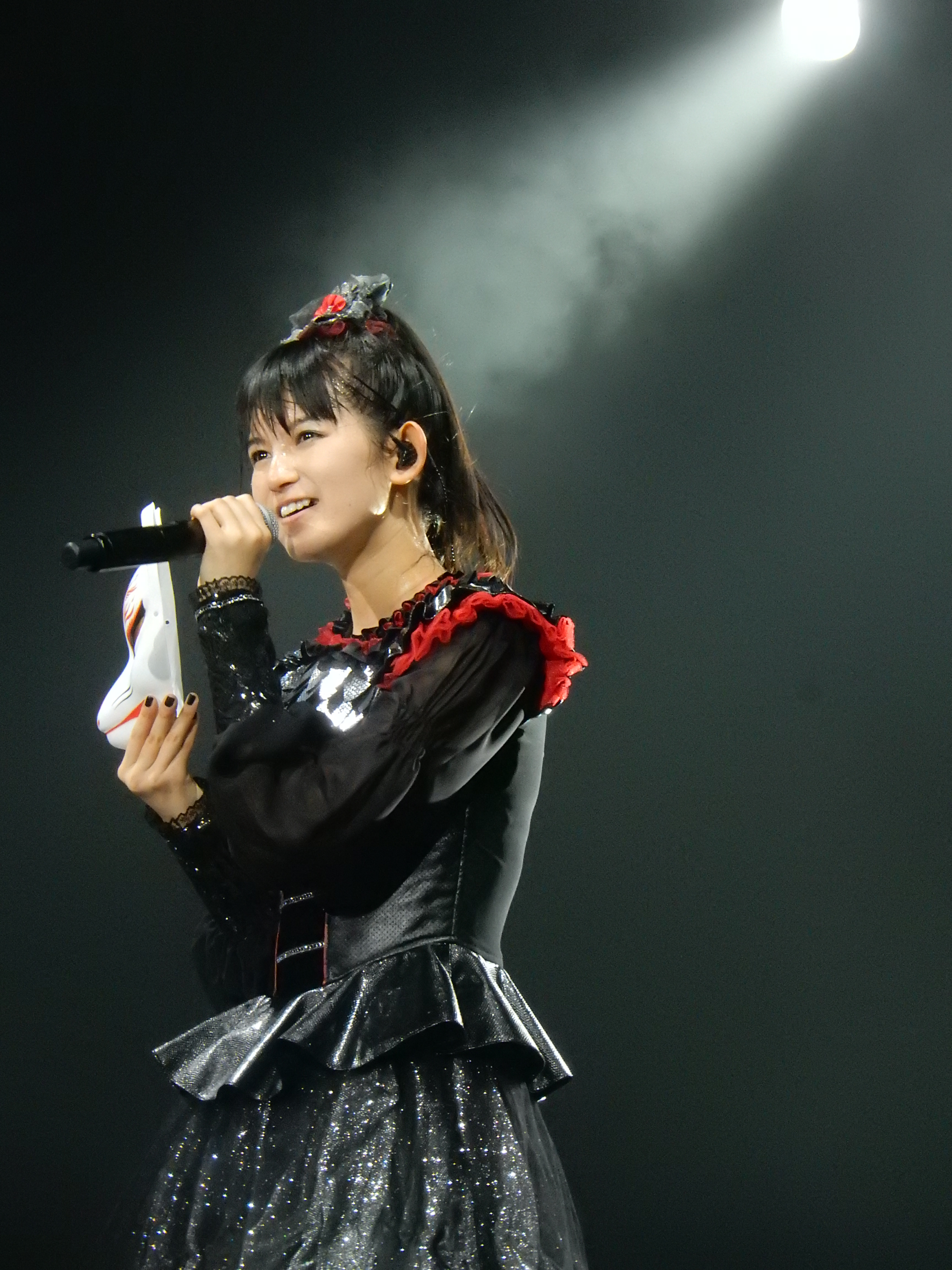 BABYMETAL, O2 Arena, London